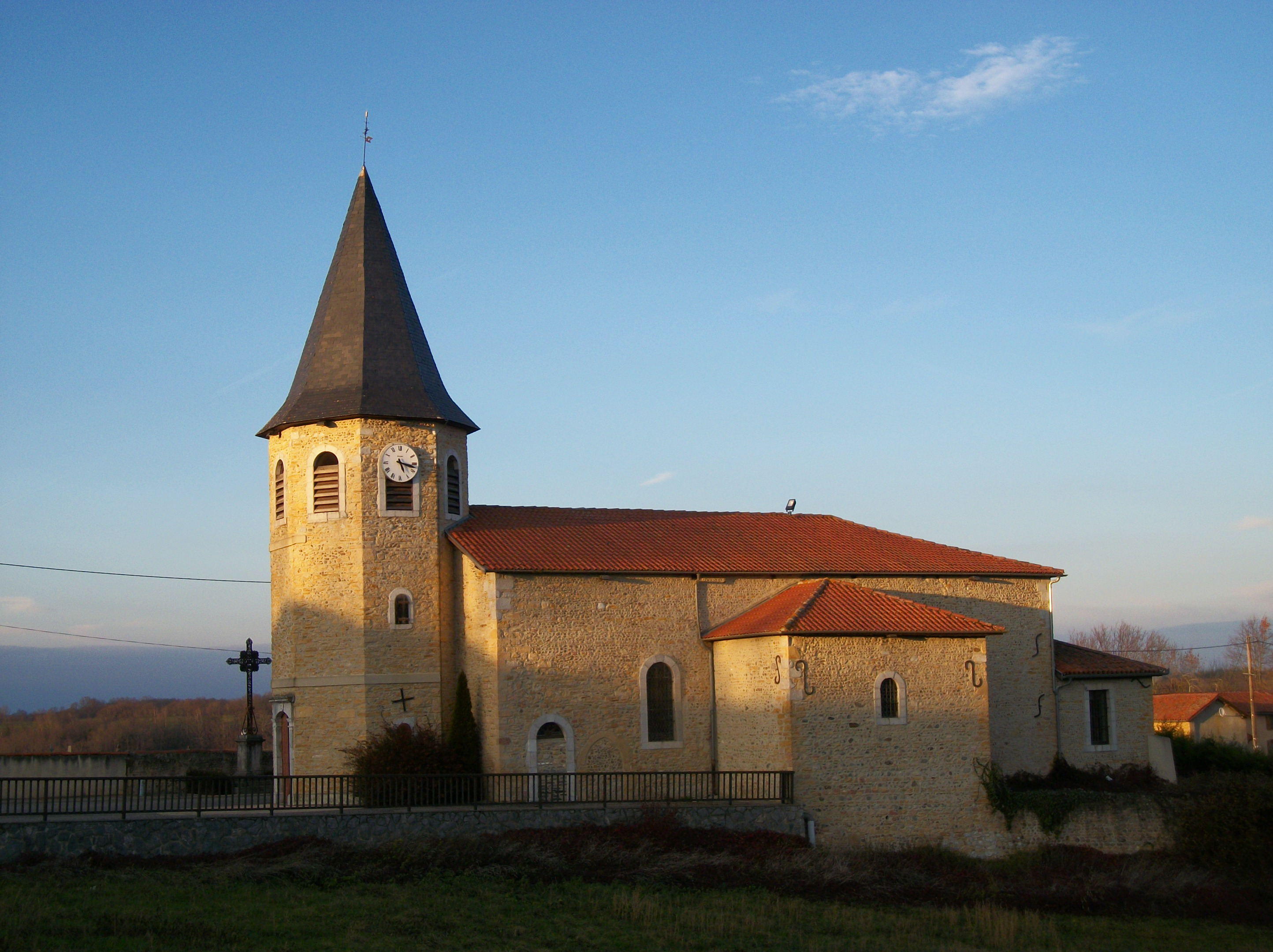 Église Saint-Pierre